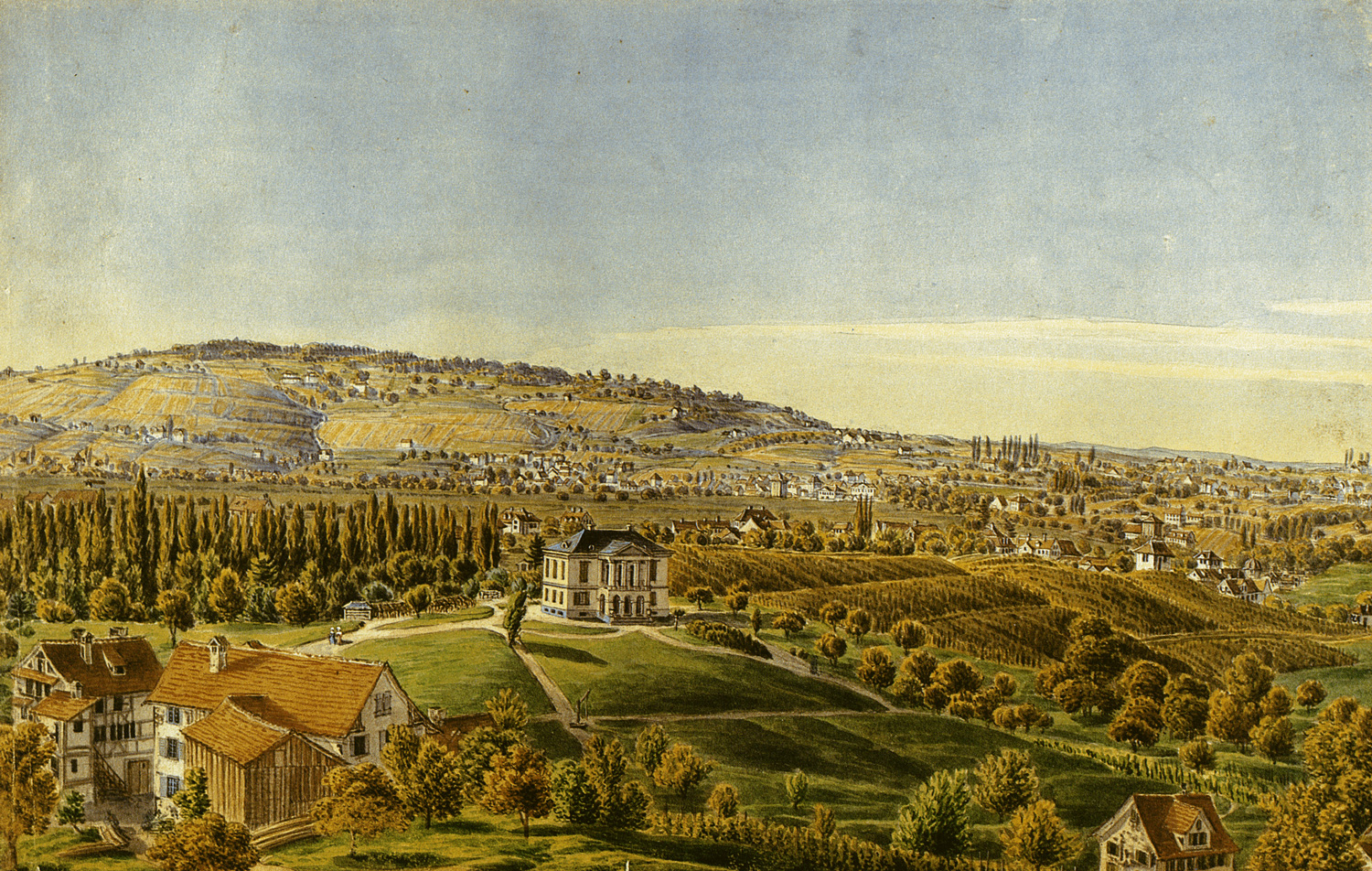 Die Villa Freudenberg in Zürich-Enge um 1837. Ausschnitt aus dem Panorama der Stadt Zürich von Paul Julius Arter von 1837, sechs Aquarelle, Blatt 2.